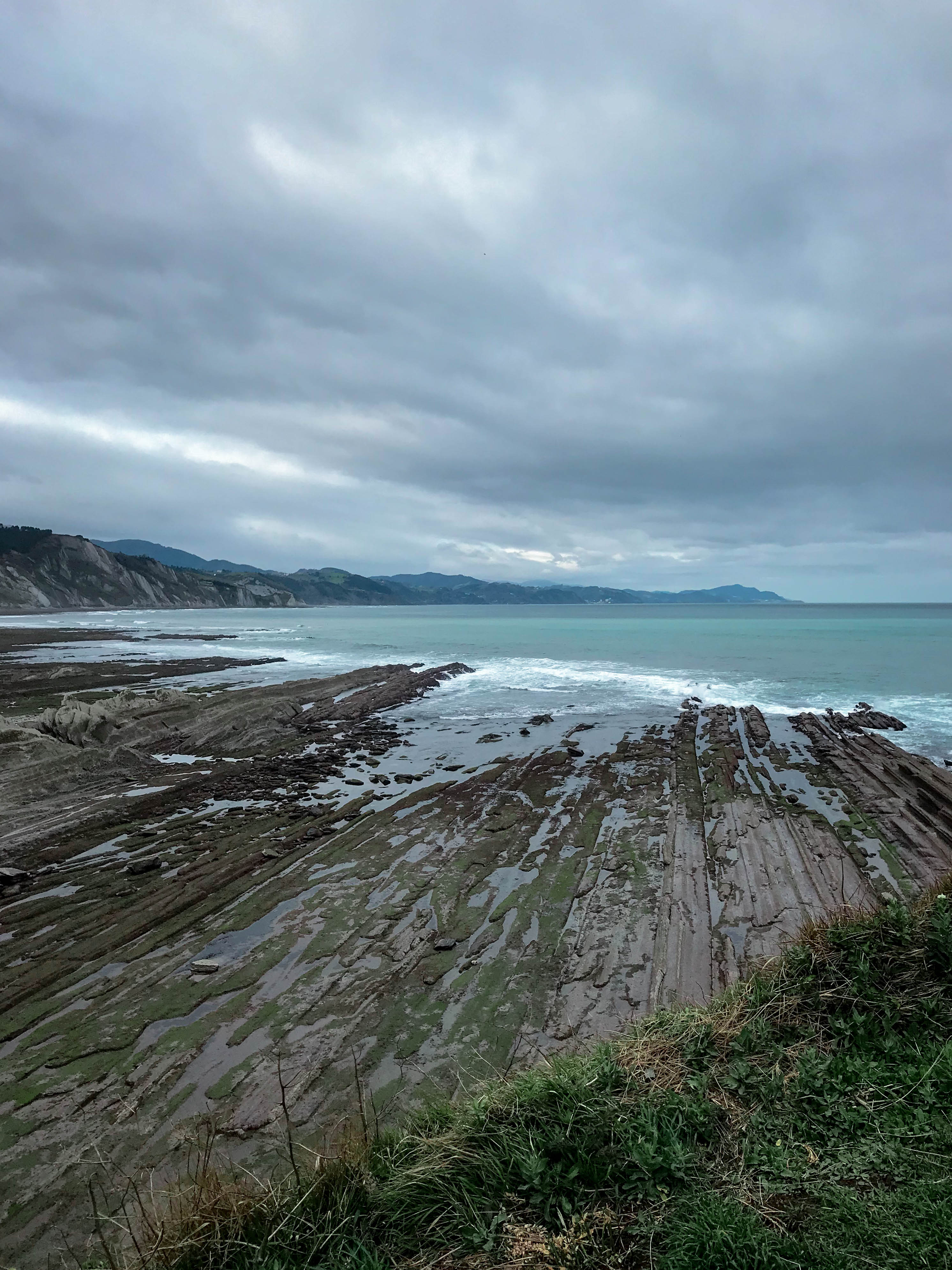 Zumaiako Algorriko Flyscha